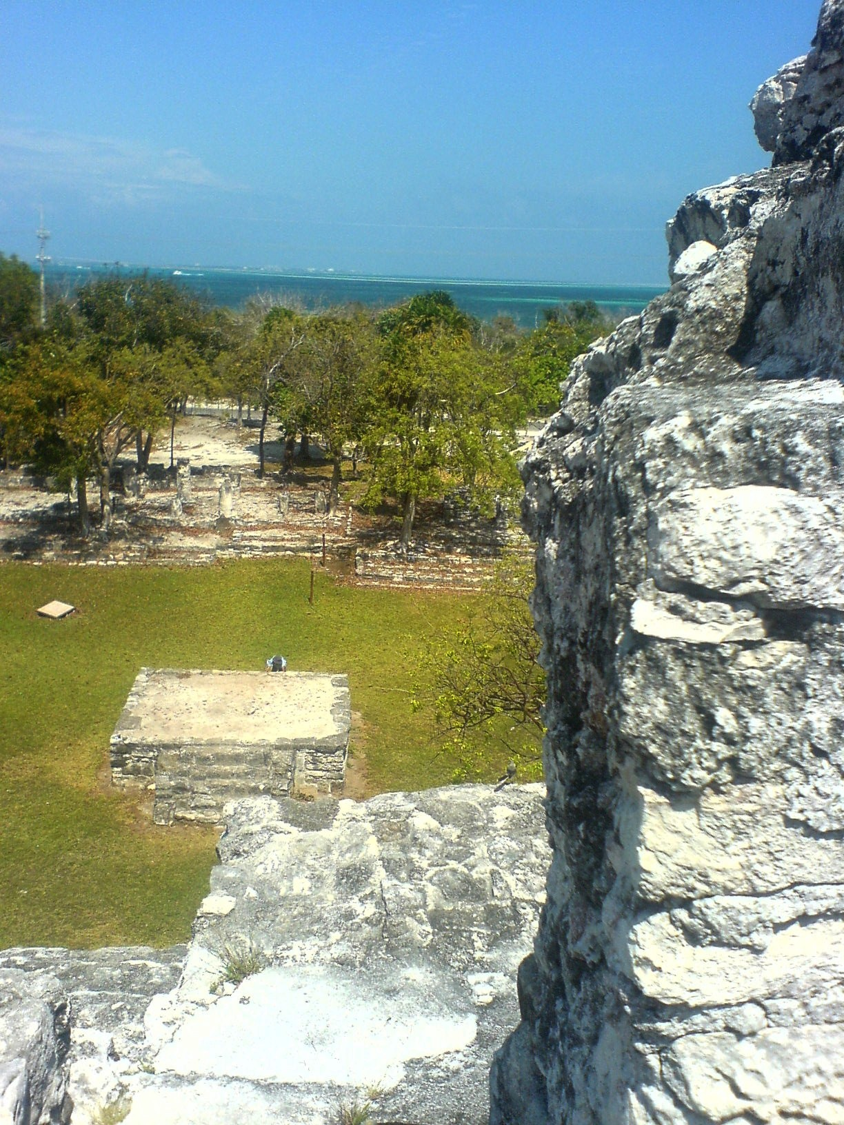 Vista aérea desde el Castillo de la zona arqueológica El Meco